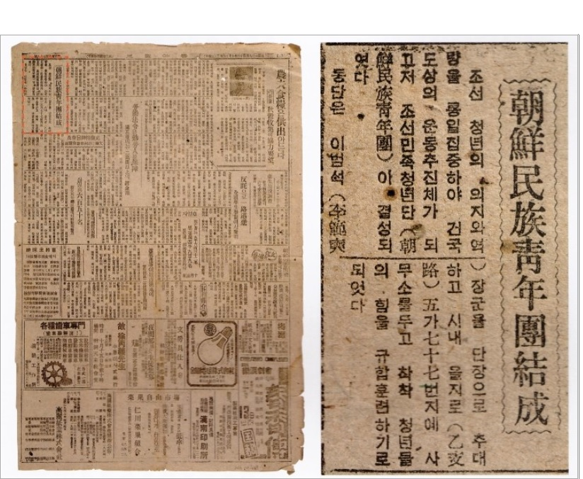 조선민족청년단 결성과 관련된 내용의 기사입니다. 조선청년의 의지와 역량을 통일집중하여 건국도상의 운동추진체가 되기 위해 족청을 결성했다는 내용이 게재됐습니다.